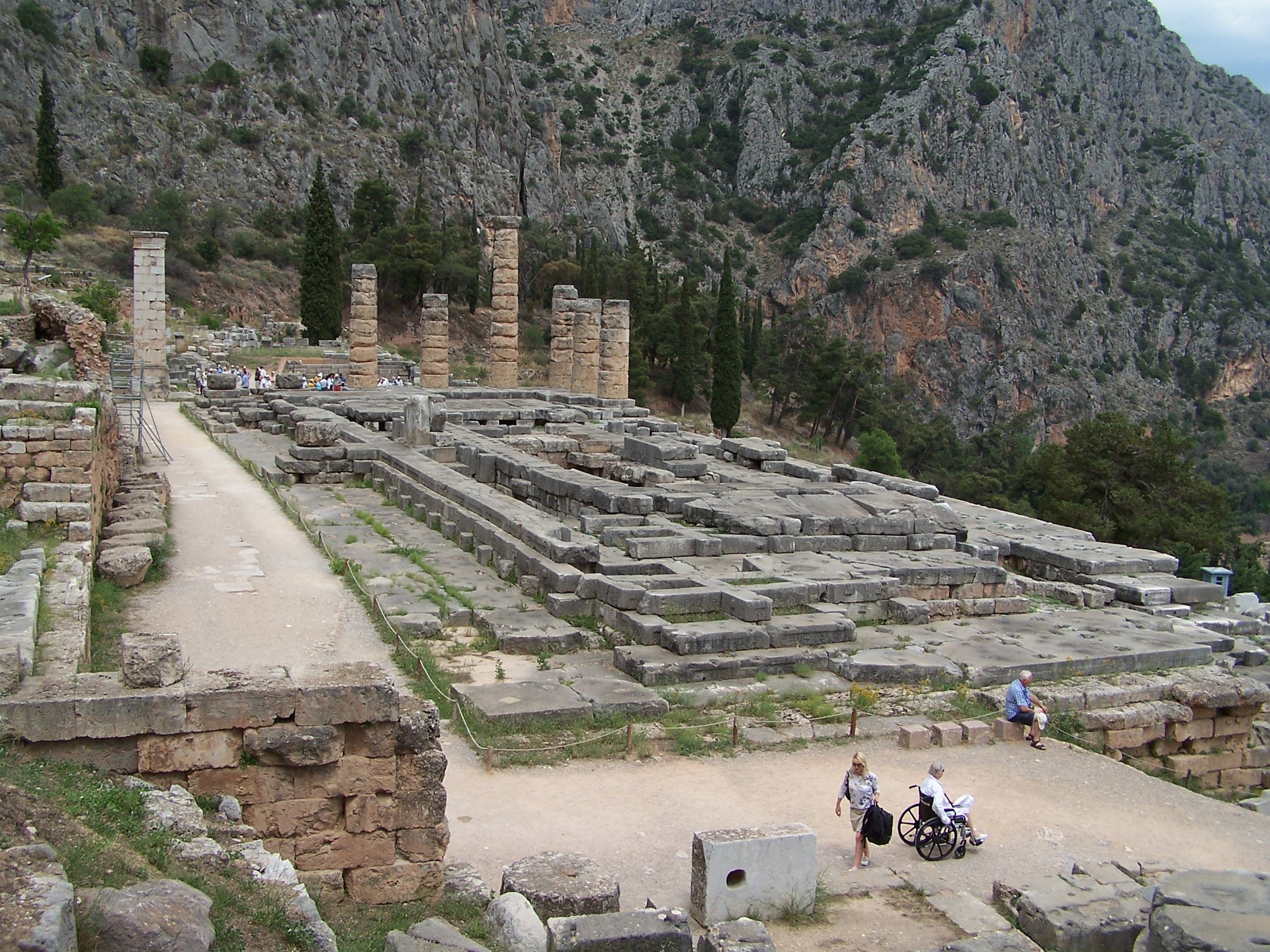 Delphi